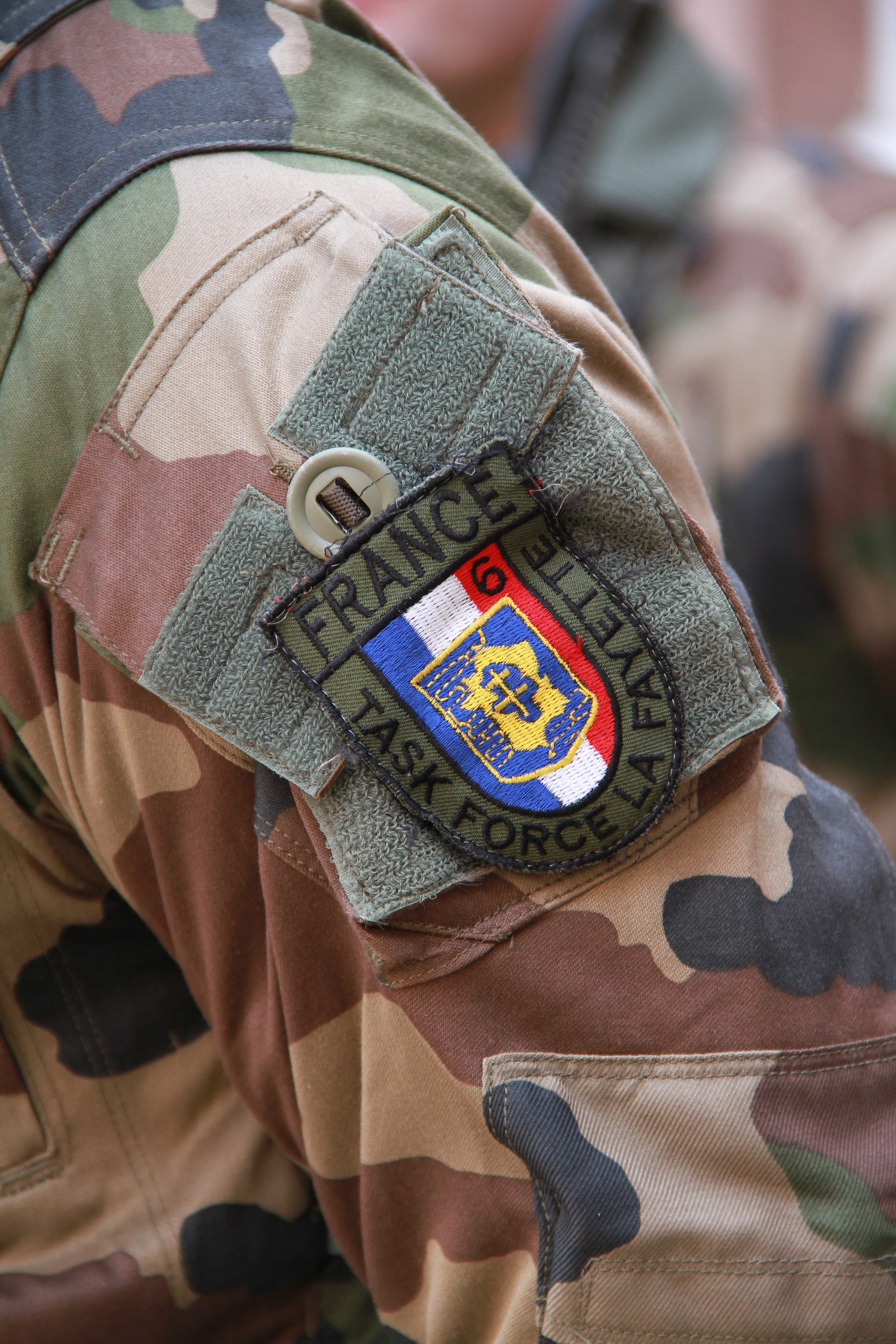 Prise d'armes au Palais du gouverneur militaire de Strasbourg, le 31 janvier 2013, en présence du général Bertrand Ract-Madoux, chef d’état-major de l’armée de terre à l’occasion du retour en France de la Task force Lafayette.